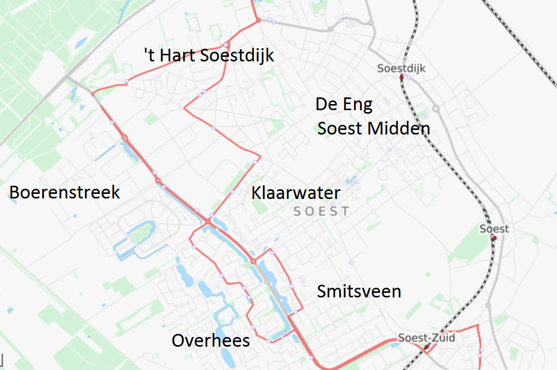 Wijkindeling van Soest zoals aangegeven op